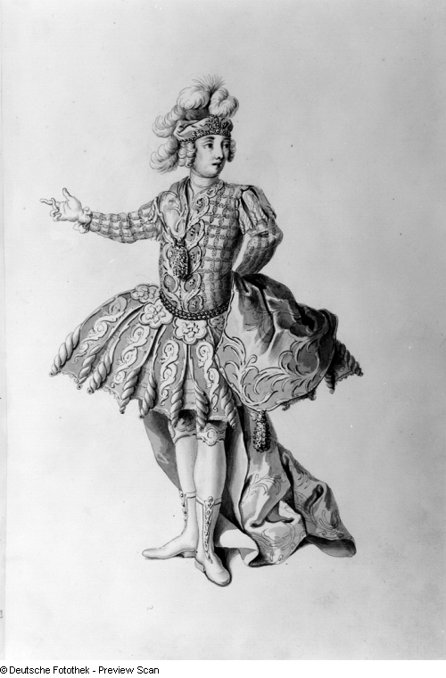 Angelo Amorevoli als Manlio in der Oper "Attilio Regolo" von Johann Adolph Hasse. Hoftheater Dresden, Uraufführung 12. Januar 1750. Federzeichnung von Francesco Ponte In: Vestiarium der Oper "Attilio Regolo". Dresden: Kupferstich-Kabinett Ca 103 Blatt 4